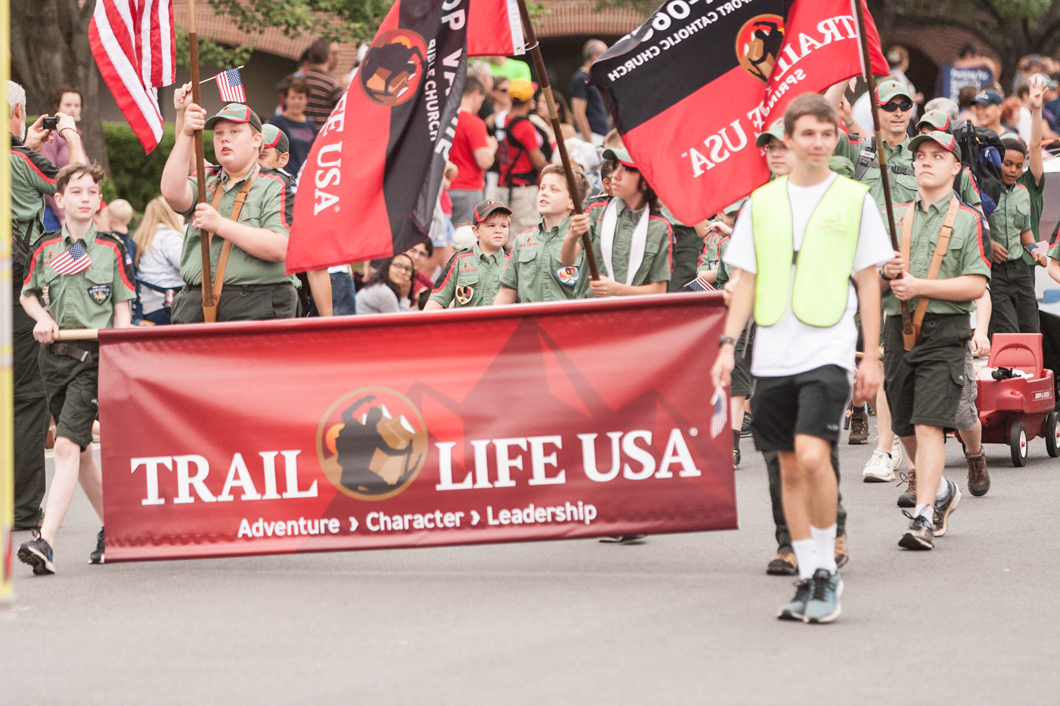 QD3J0337.jpg